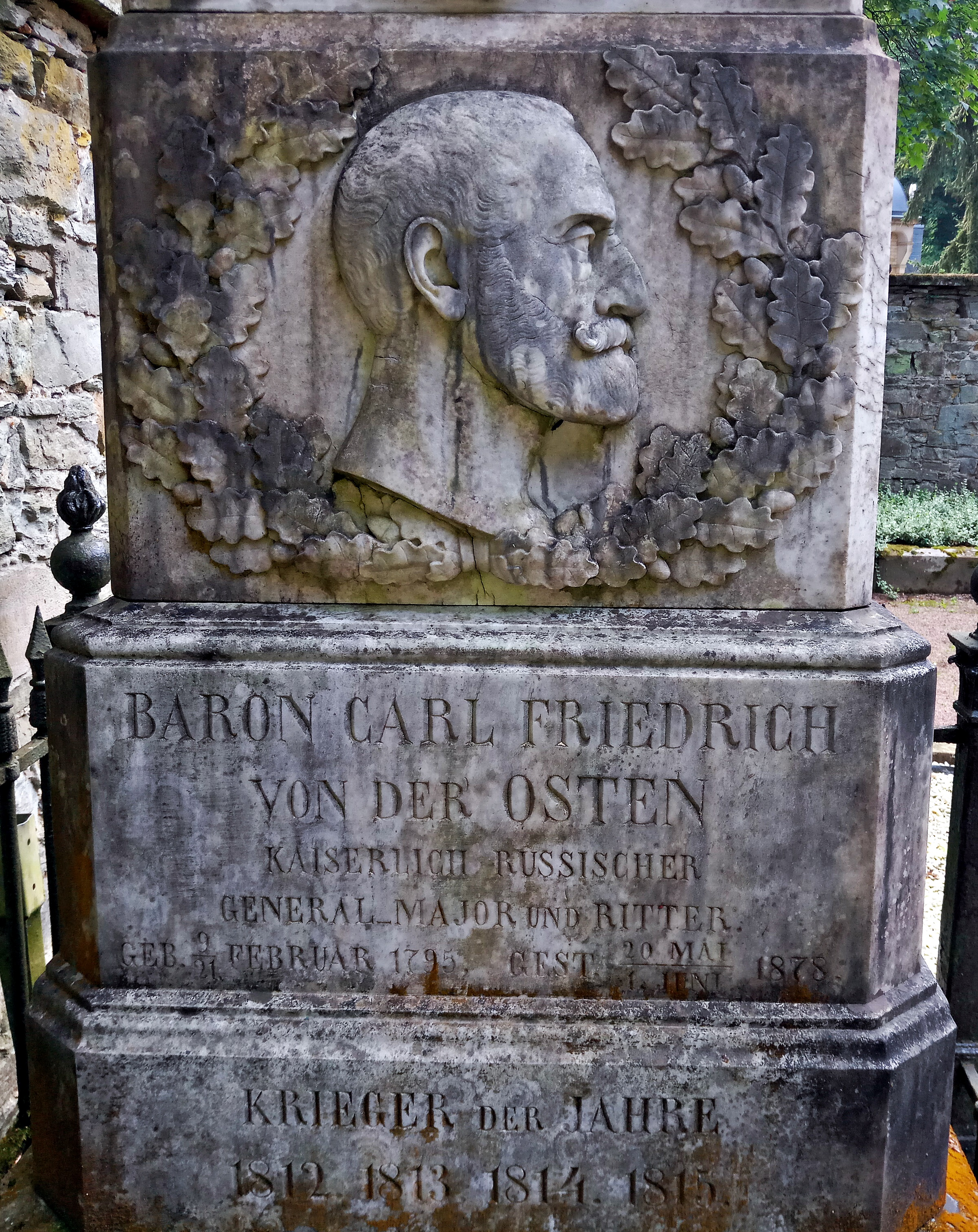 Russischer Friedhof Wiesbaden Grab Generalmajor Carl Friedrich von der Osten (1795-1878), Porträtrelief